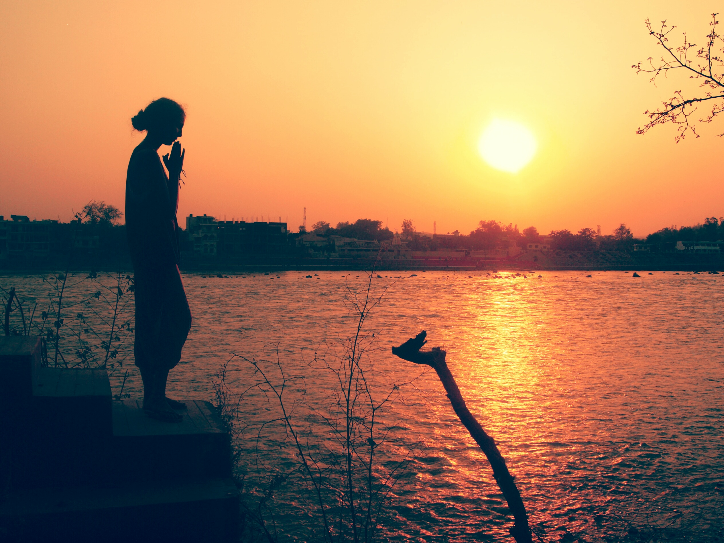 Ganges river. Sunset puja, pooja India